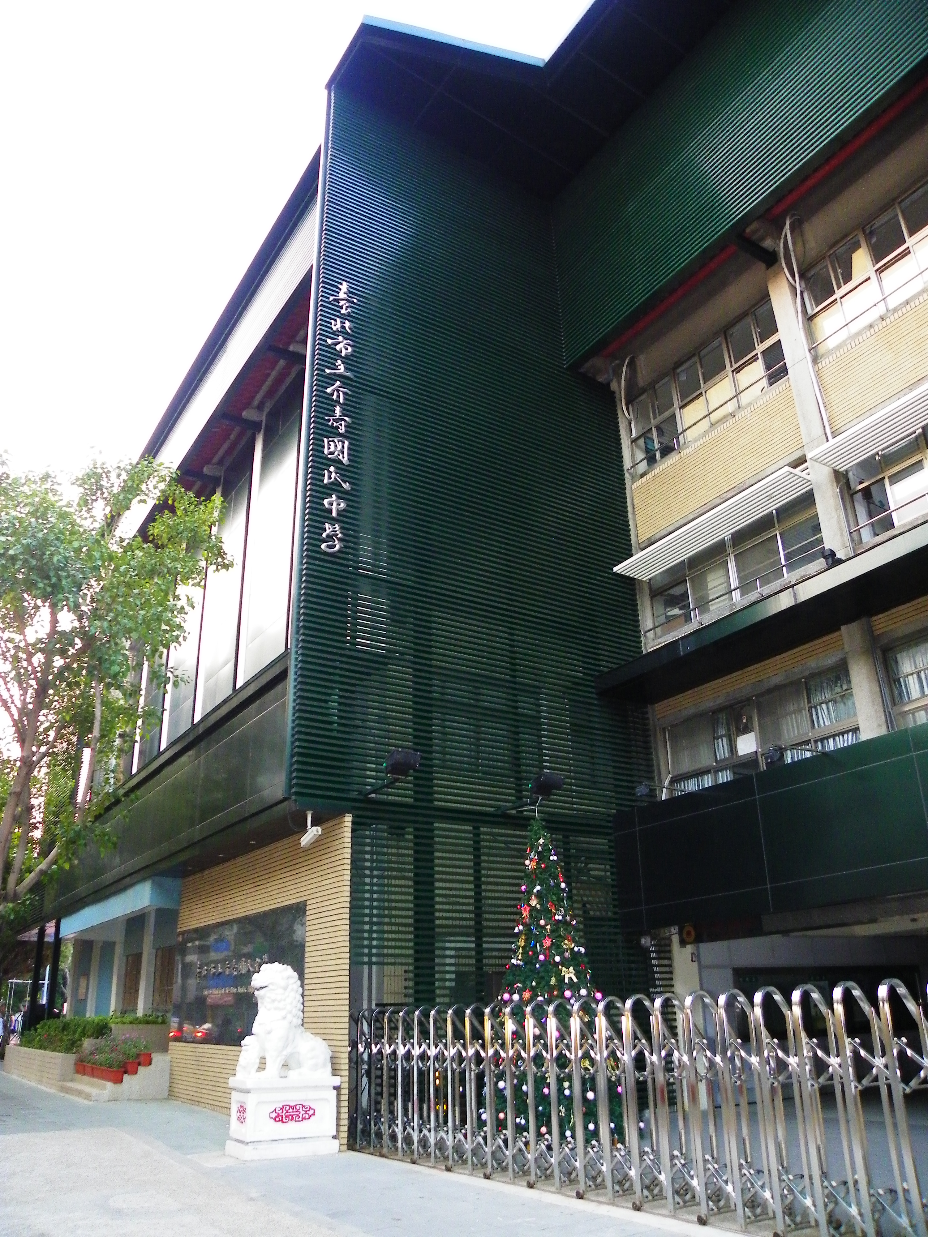 台北市立介寿国民中学正門。